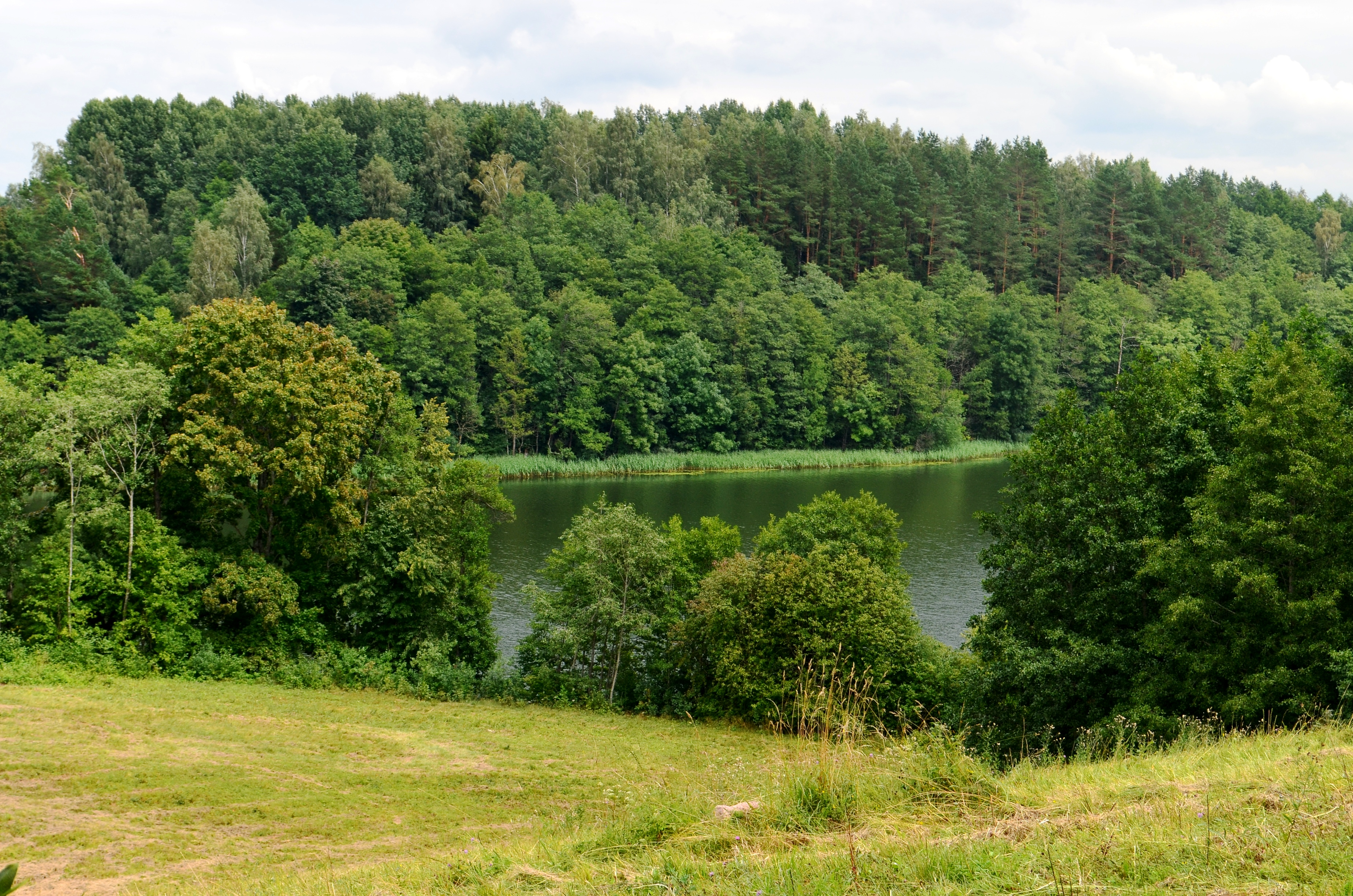 Lūšykščio ež. nuo Kaukiškės k., Ignalinos raj.